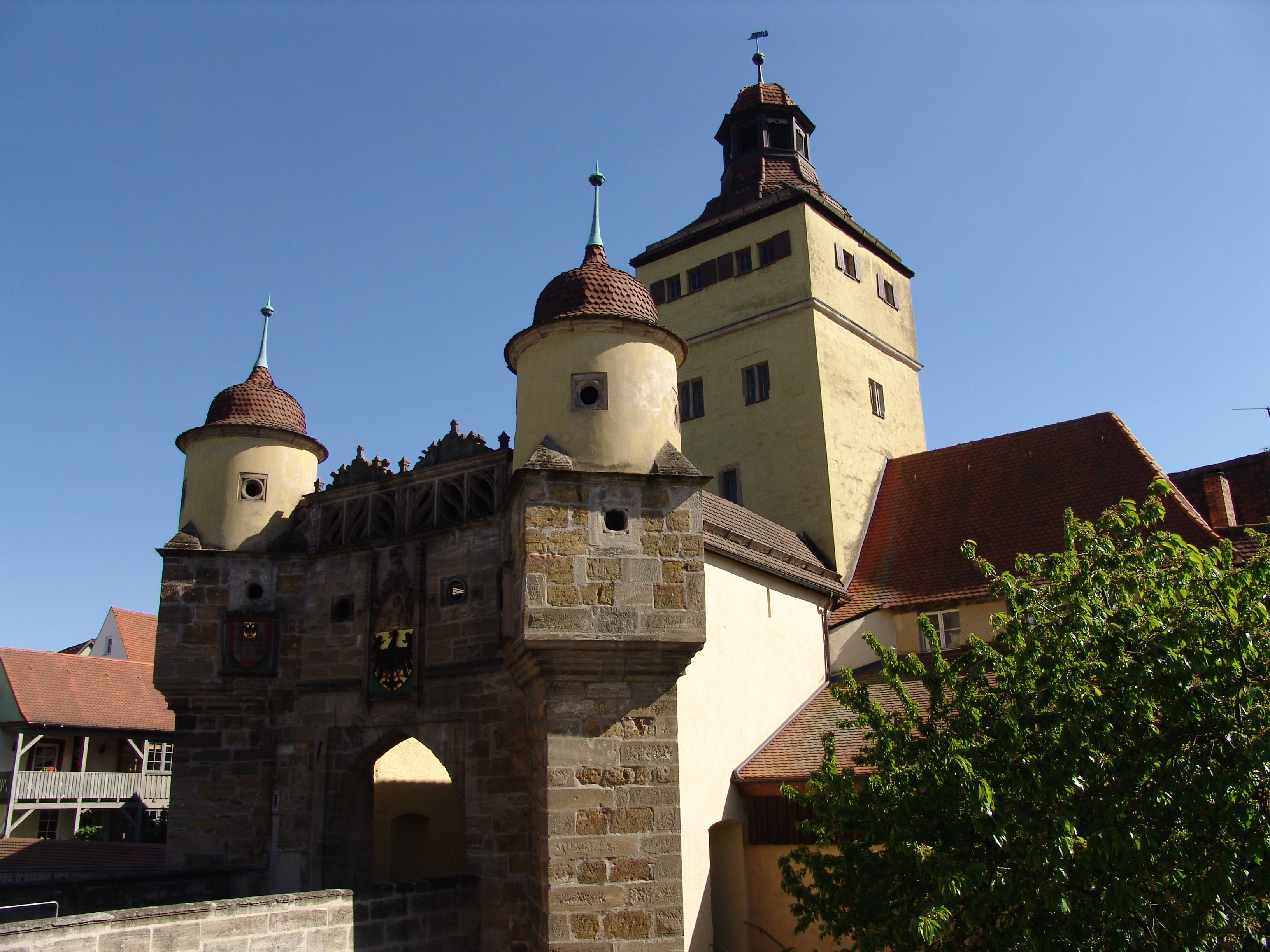 Weißenburg in Bayern, Ellinger Tor